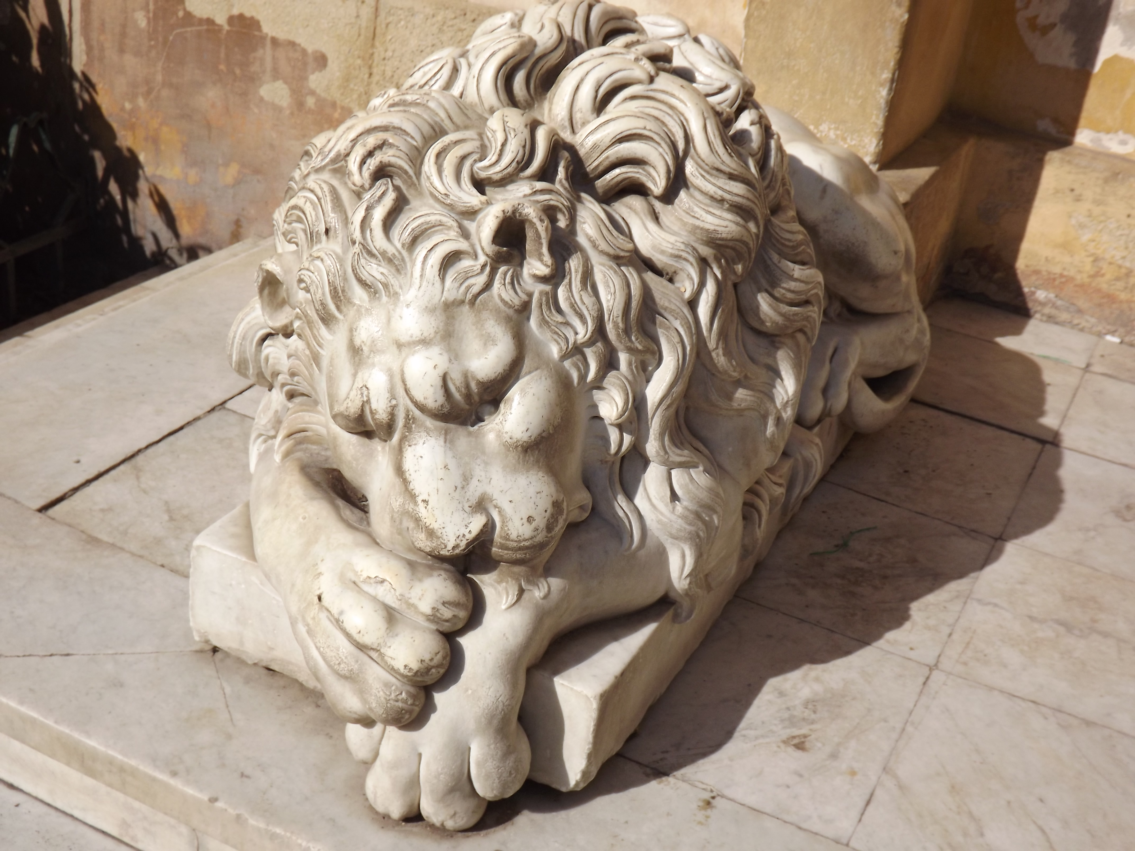 حديقة حيوان النزهة - الاسكندرية